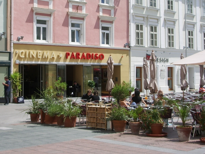 Cinema*Paradiso, St. Pölten, Lower Austria, Austria